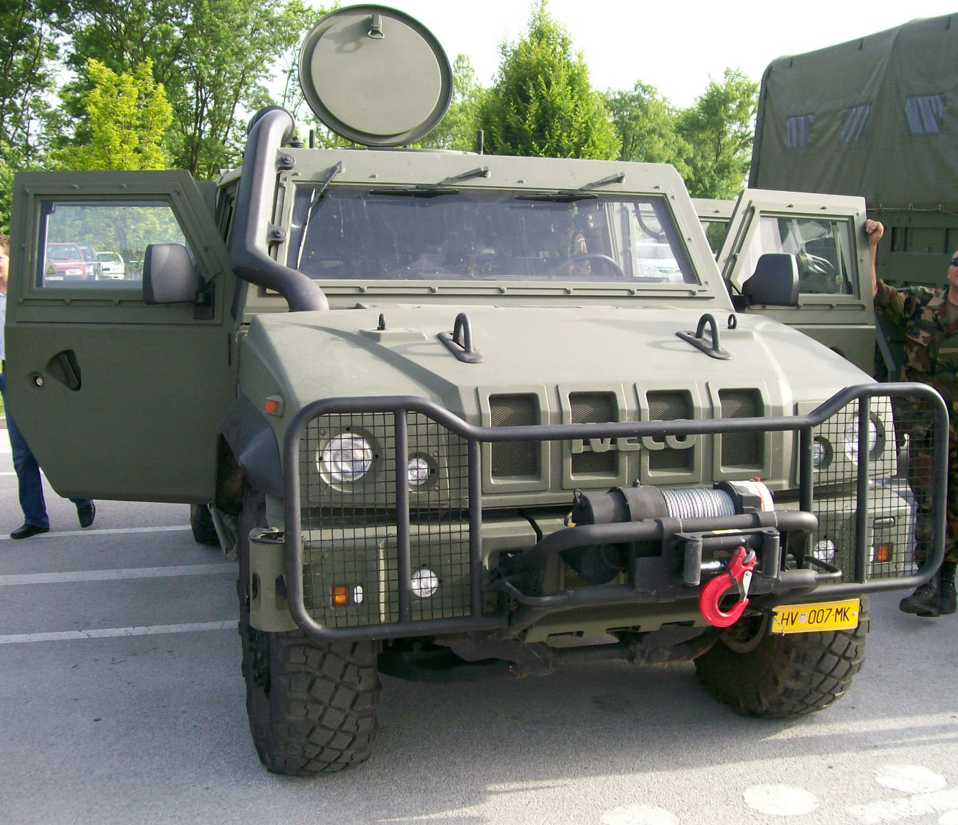 IVECO lako oklopno vozilo Hrvatske vojske